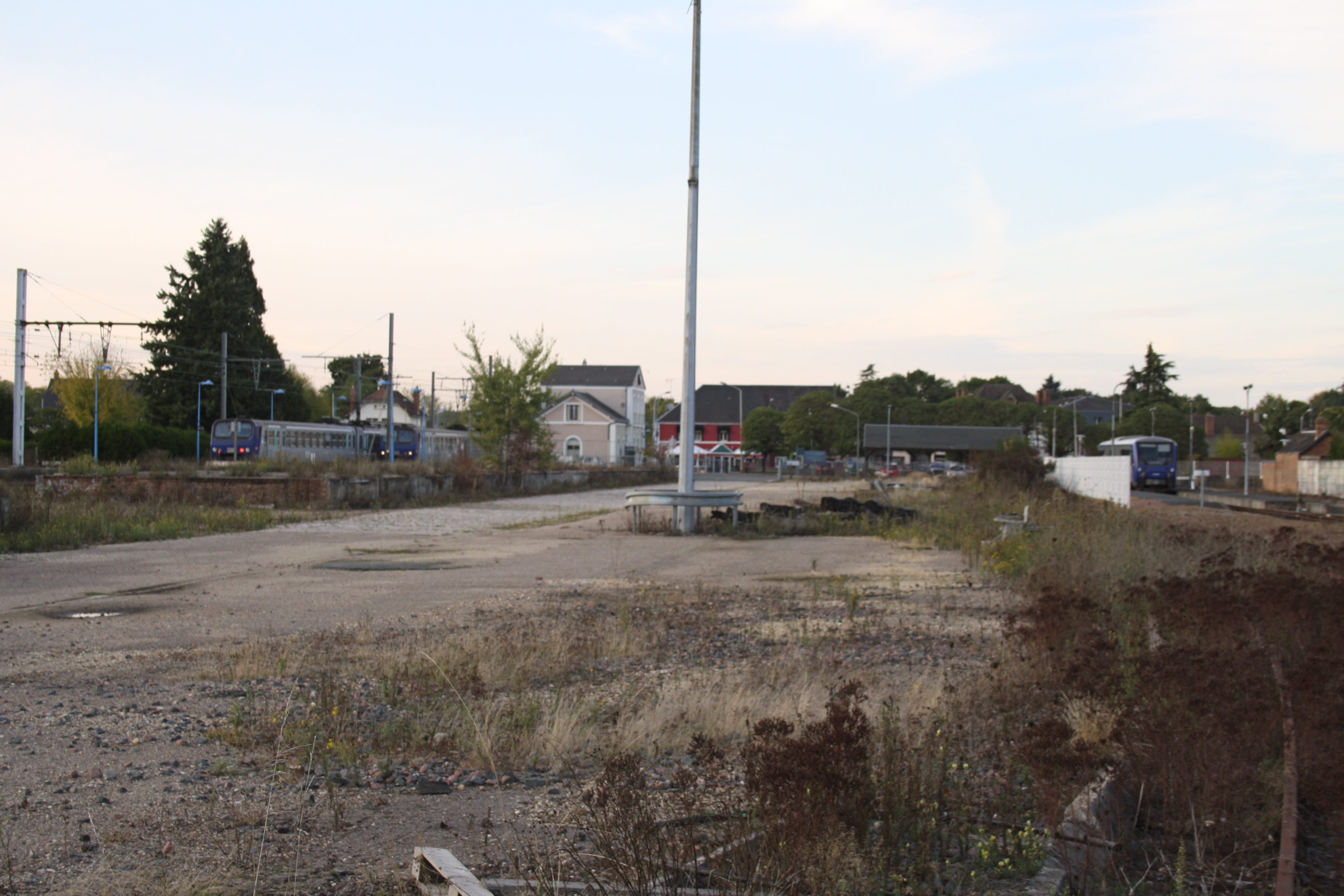 Bahnhof Salbris – links Regelspur, rechts Schmalspur